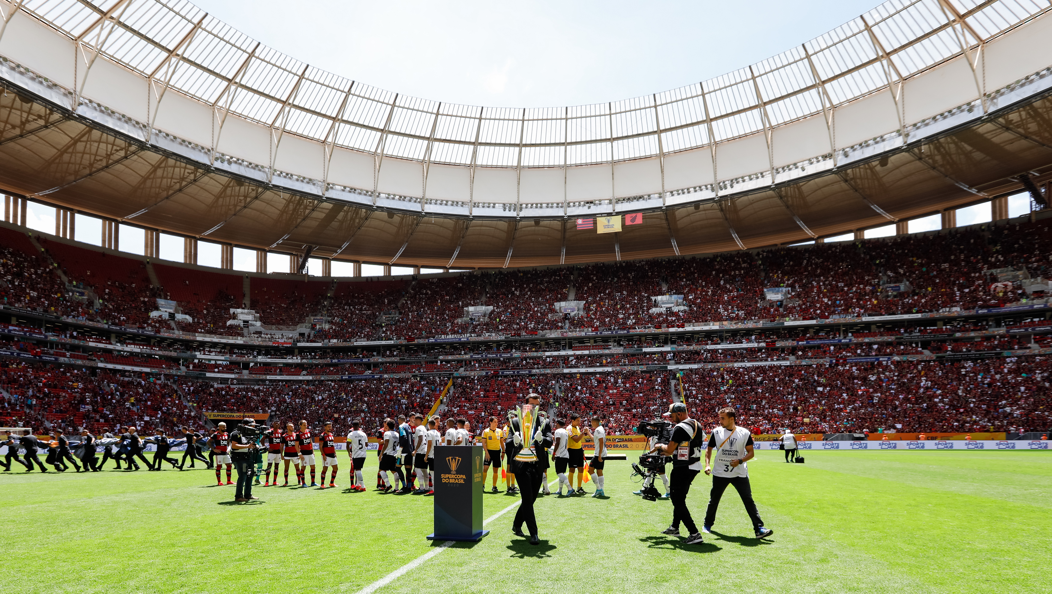 (Brasília - DF, 16/02/2020) Jogo Flamengo x Atlético PR. Foto: Carolina Antunes/PR